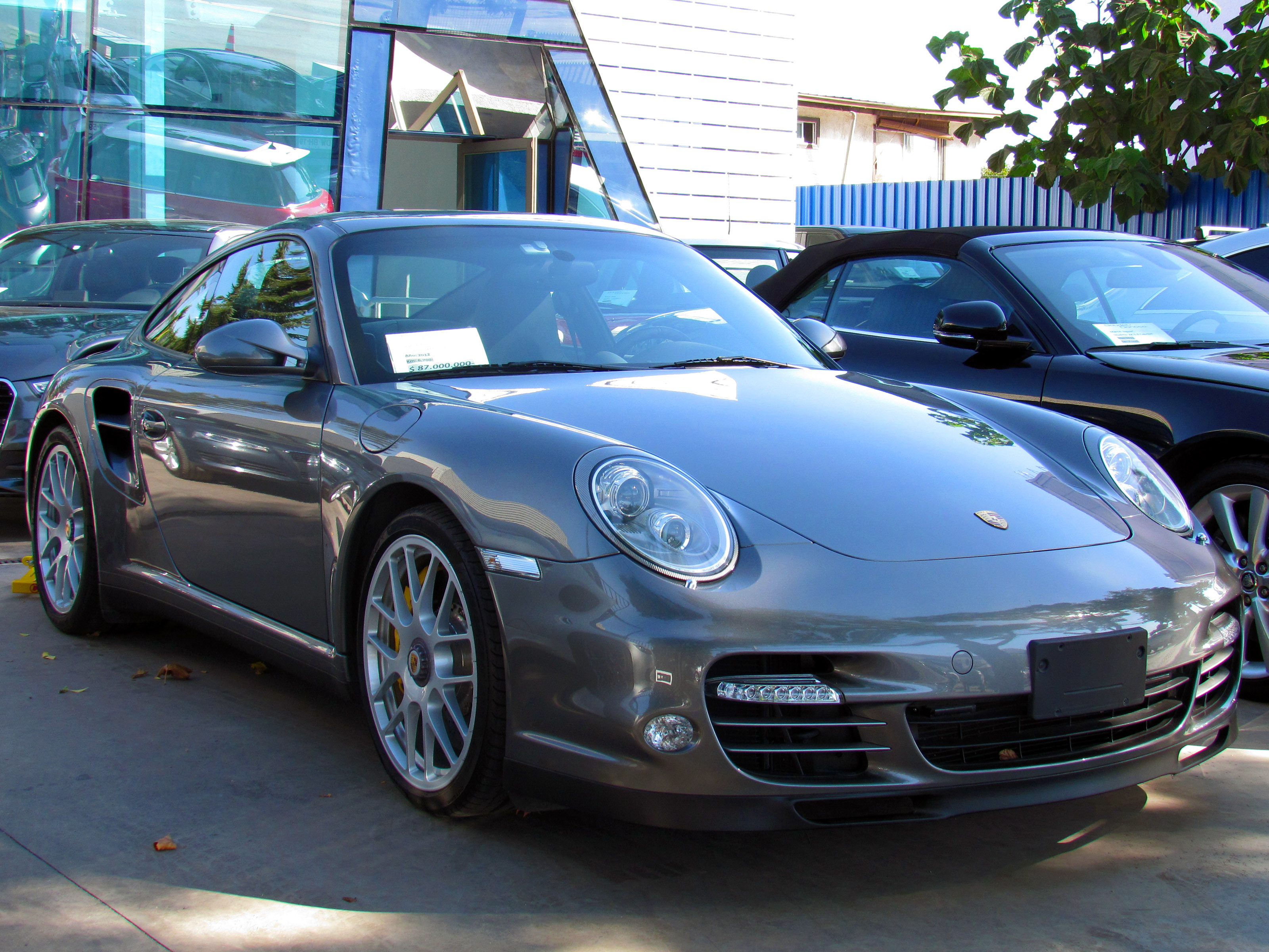 Porsche 911 Turbo 2010